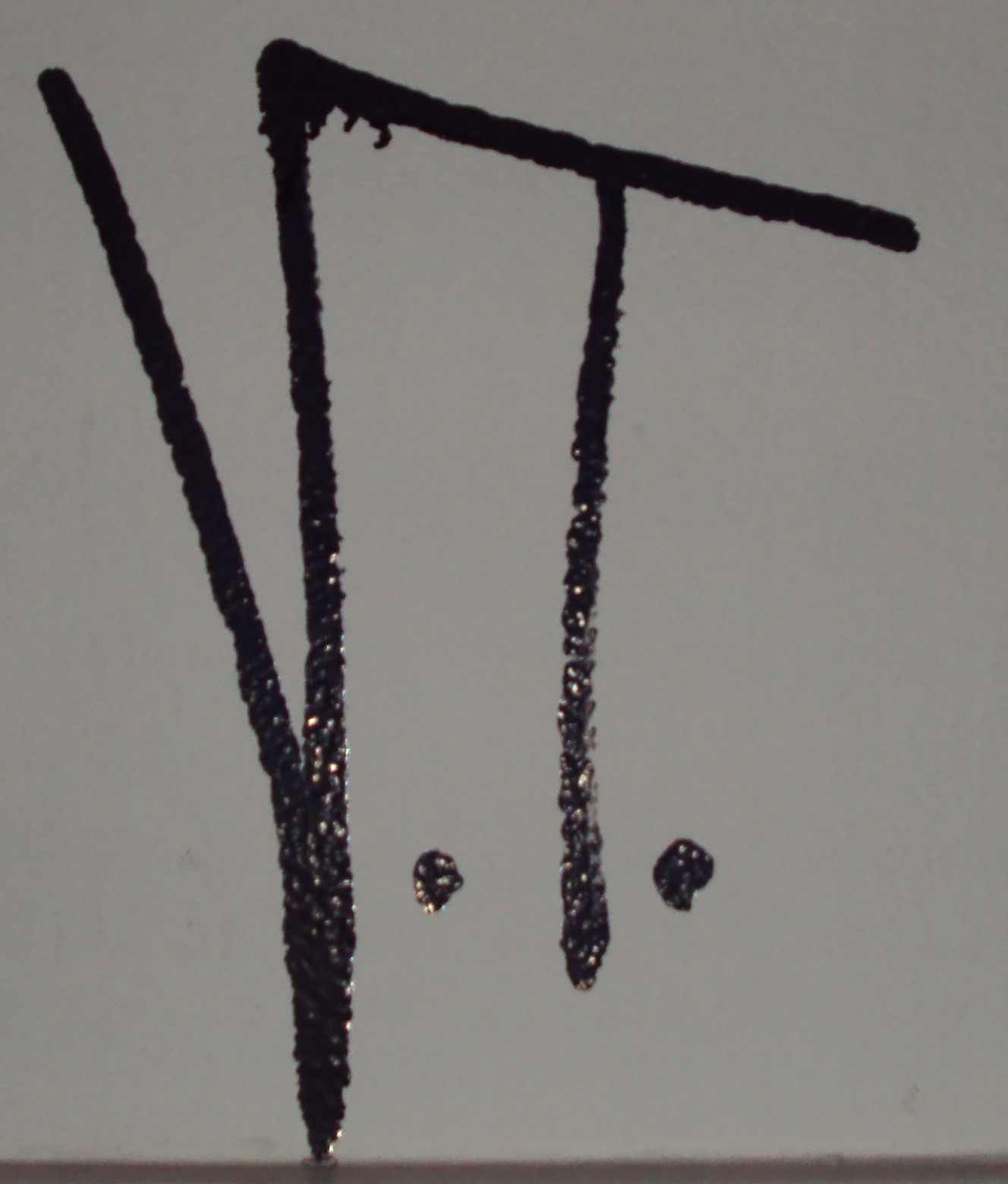 Een tag (graffiti)